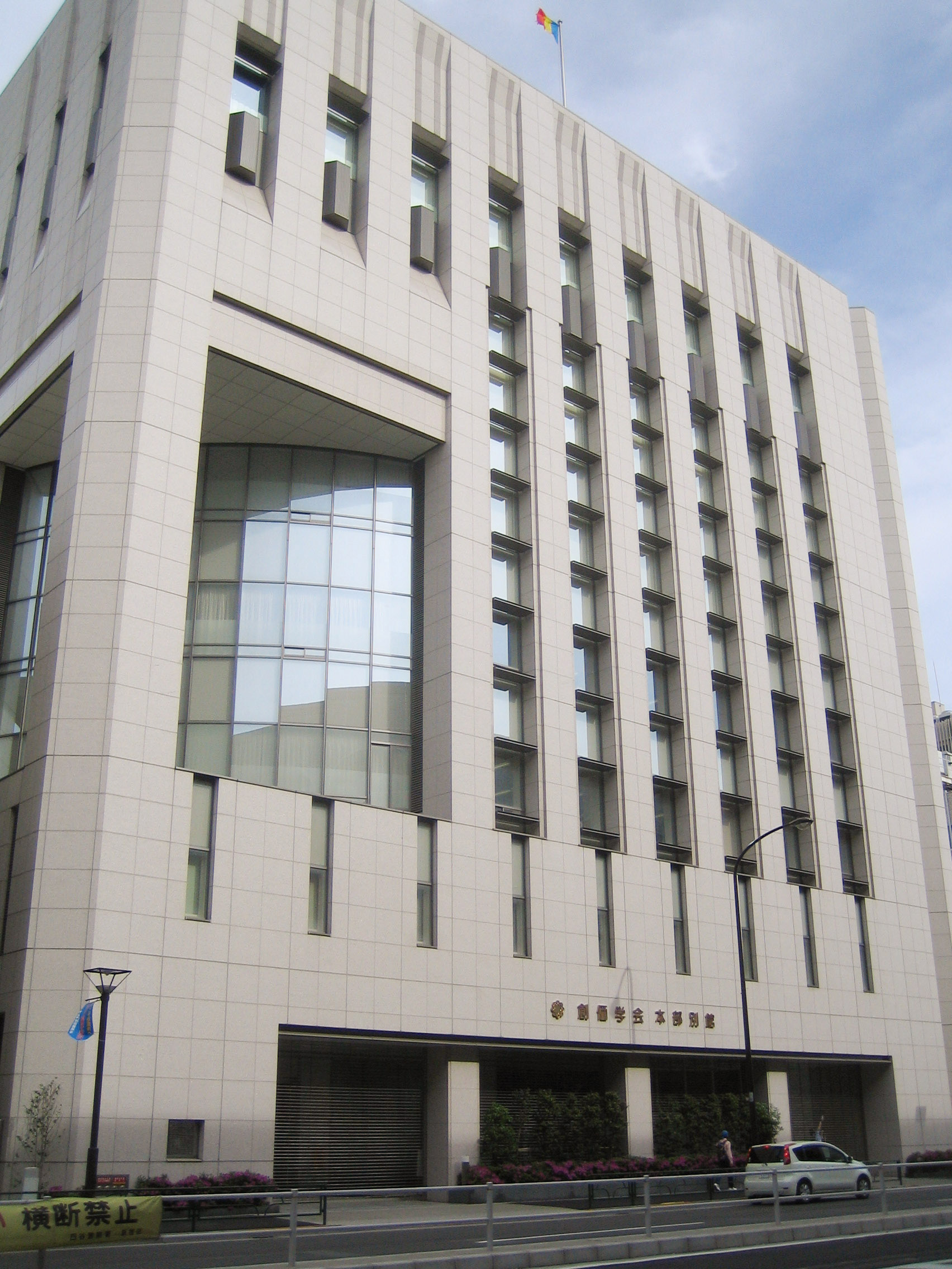 Soka Gakkai (創価学会), at Shinanomachi, Shinjuku, Tokyo, Japan